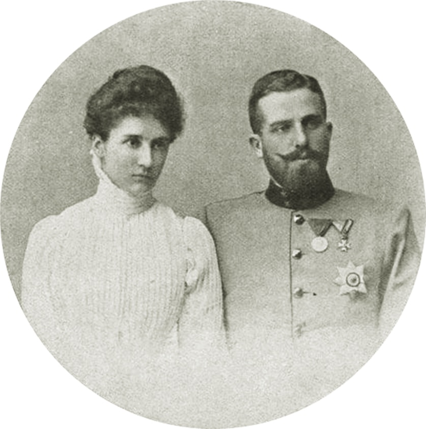 Prinzessin Mathilde von Bayern (1877-1906) mit ihrem Gatten Ludwig Gaston von Sachsen-Coburg und Gotha (1870-1942)